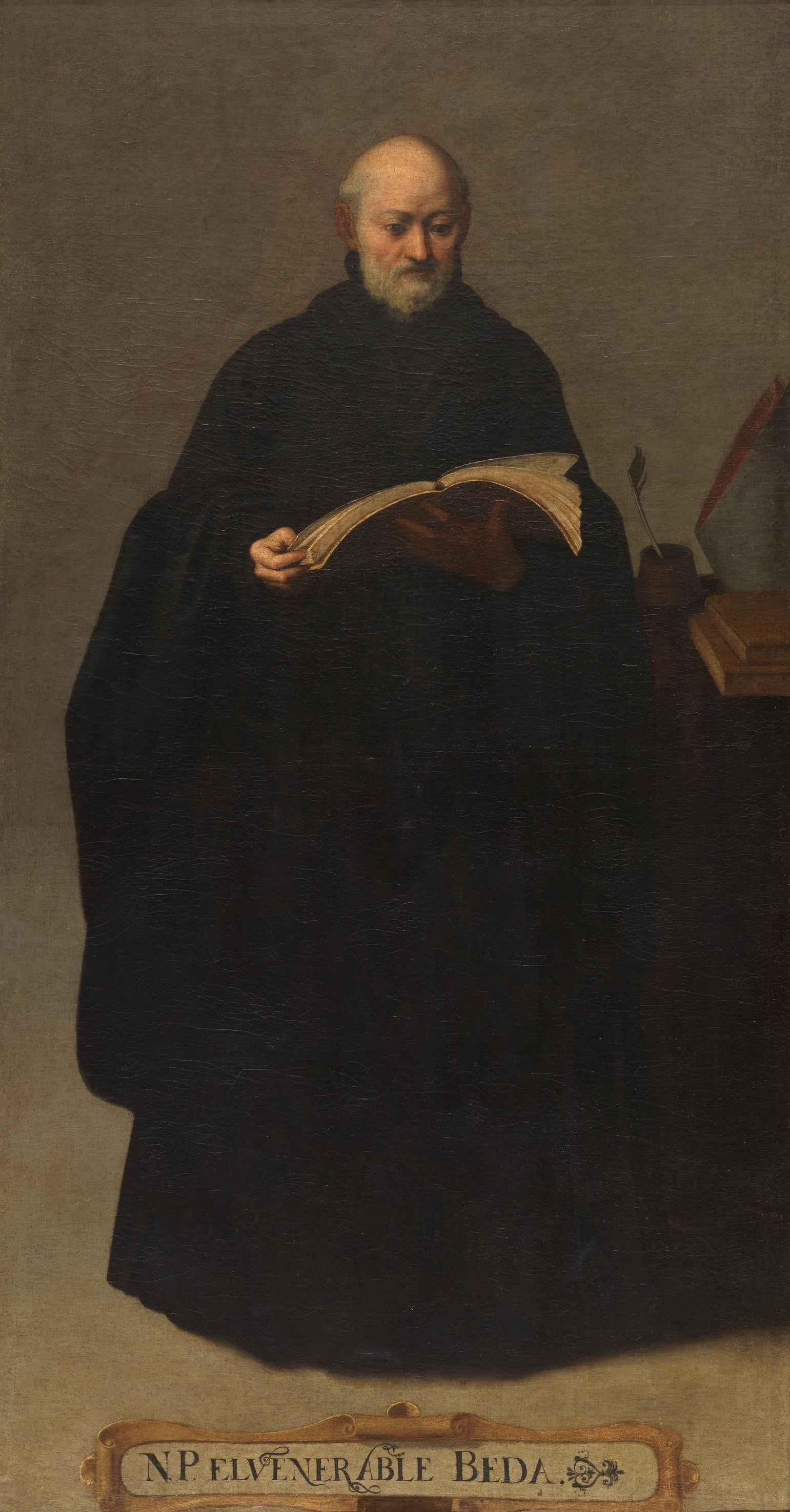 La obra representa a San Beda, más conocido como Beda el Venerable.